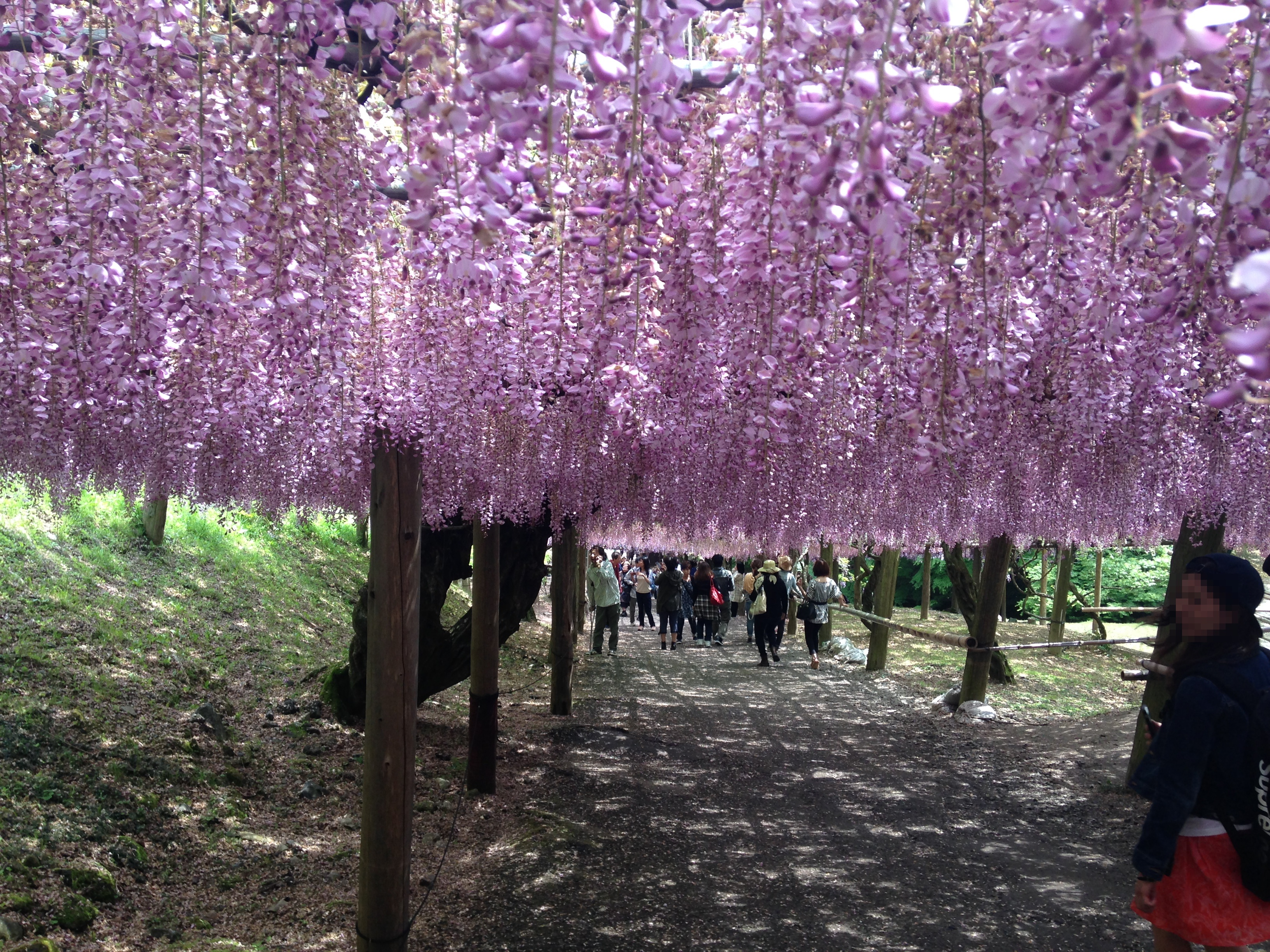 河内藤園の赤紫フジ